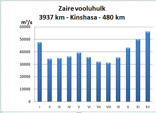 Kongo jõe vooluhulk Kinasas